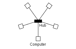 Stärtopologie (Oktober 2005).